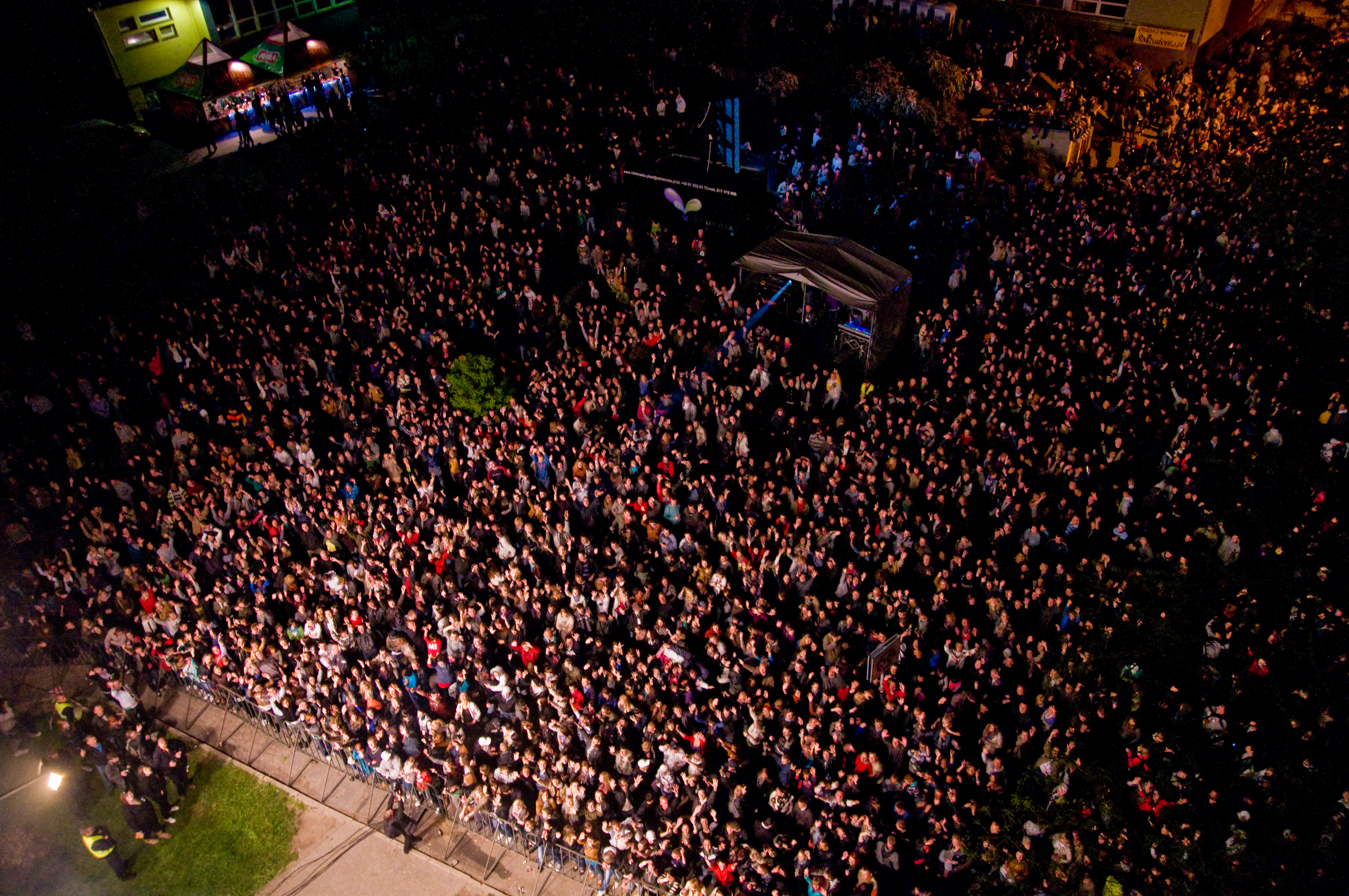 Publiczność podczas koncertu w ramach Kozienaliów